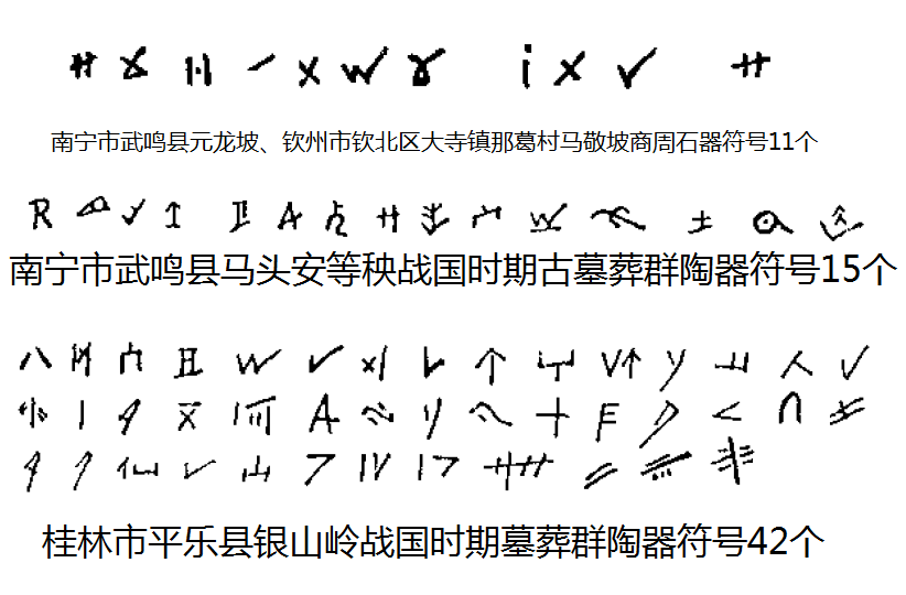 中文（中国大陆）: 广西出土先秦石器、陶器刻画文、刻画符号示例。